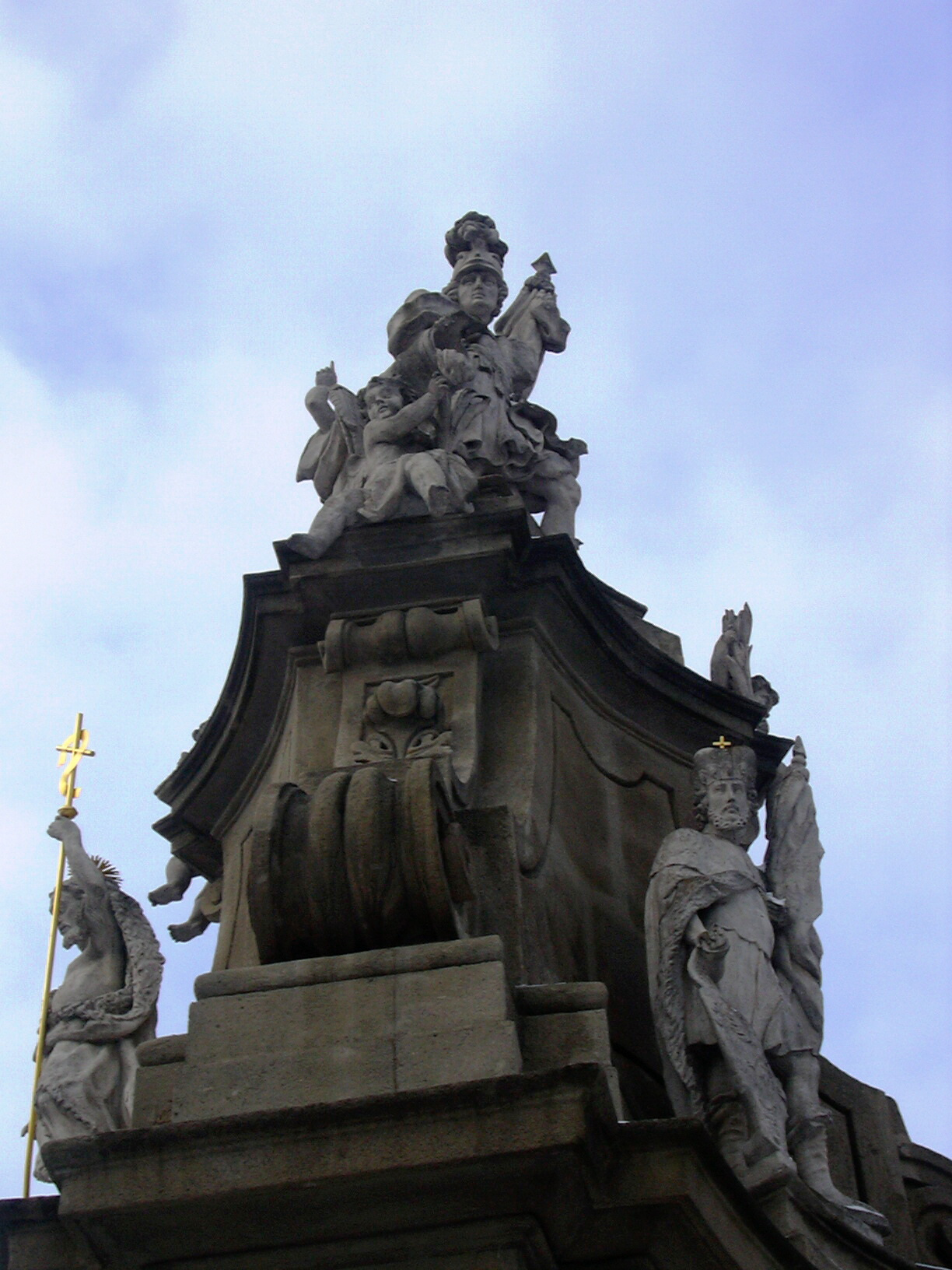 Sousoší sv. Floriána, Ivanovice na Hané, Česká republika